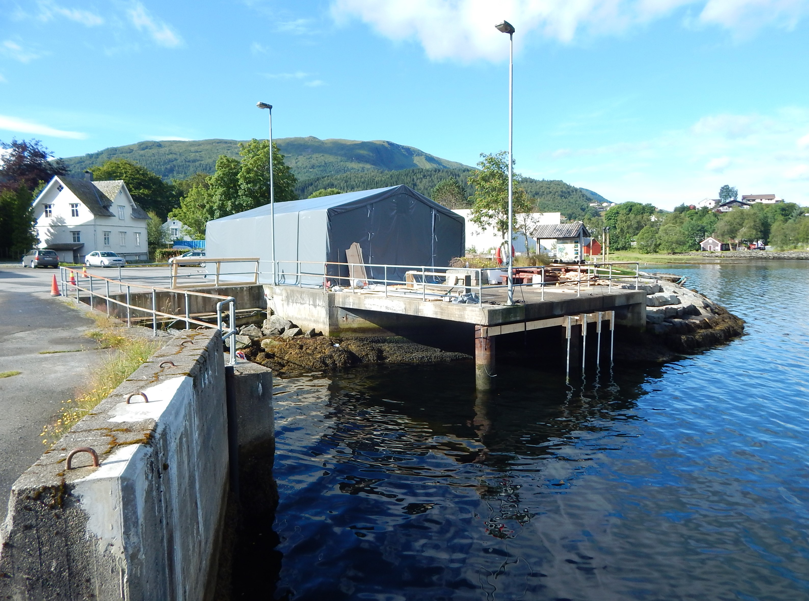 Dale fergekai, der trafikken er nedlagt etter at Dalsfjordbrua åpnet.